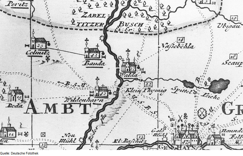 Original image description from the Deutsche Fotothek Wildenhain-Walda-Kleinthiemig. Karte des Amtes Großenhain, von Zürner, 1711, Nachträge 1730 (Sign.: VII 108)